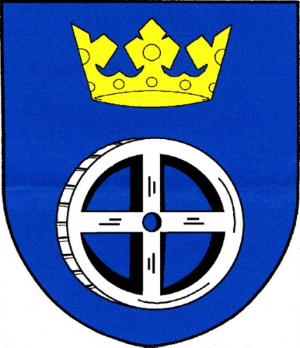 znak, Zvole, okres Žďár nad Sázavou